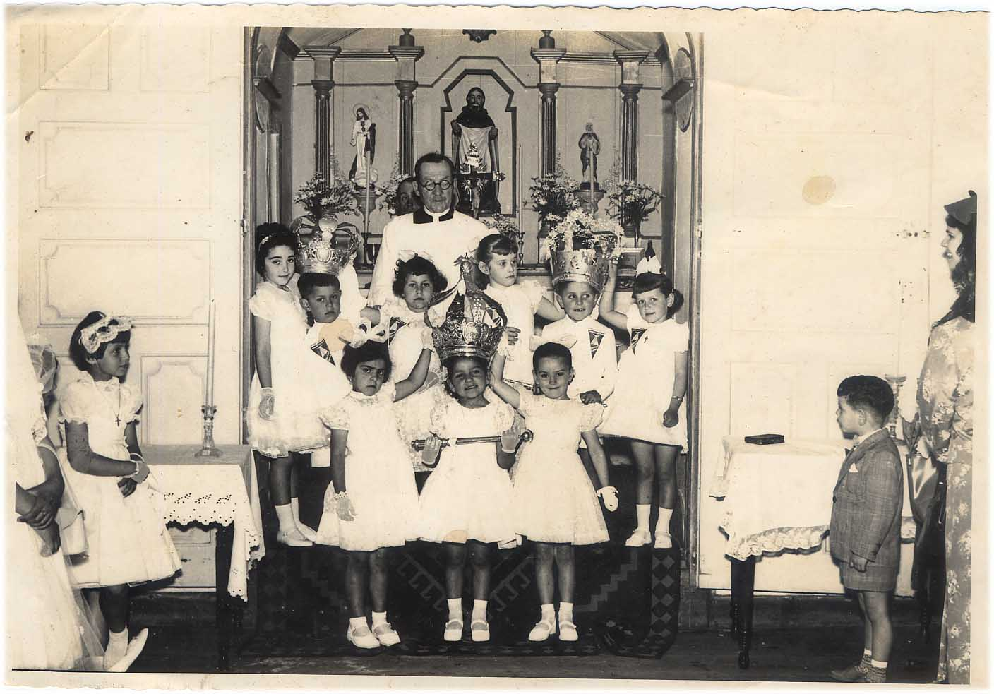 Coroação na Quinta de São Diogo, 1.ª metade do Século XX